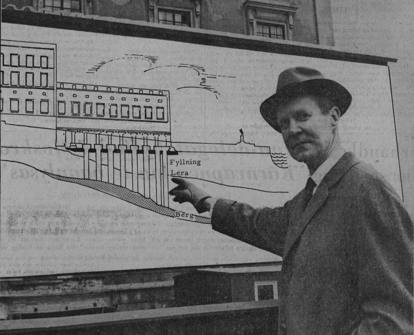 Slottsintendent Ragnar Jonsson med tvärsnittsskiss över pågående föstärkningsarbeten vid Stockholms slott